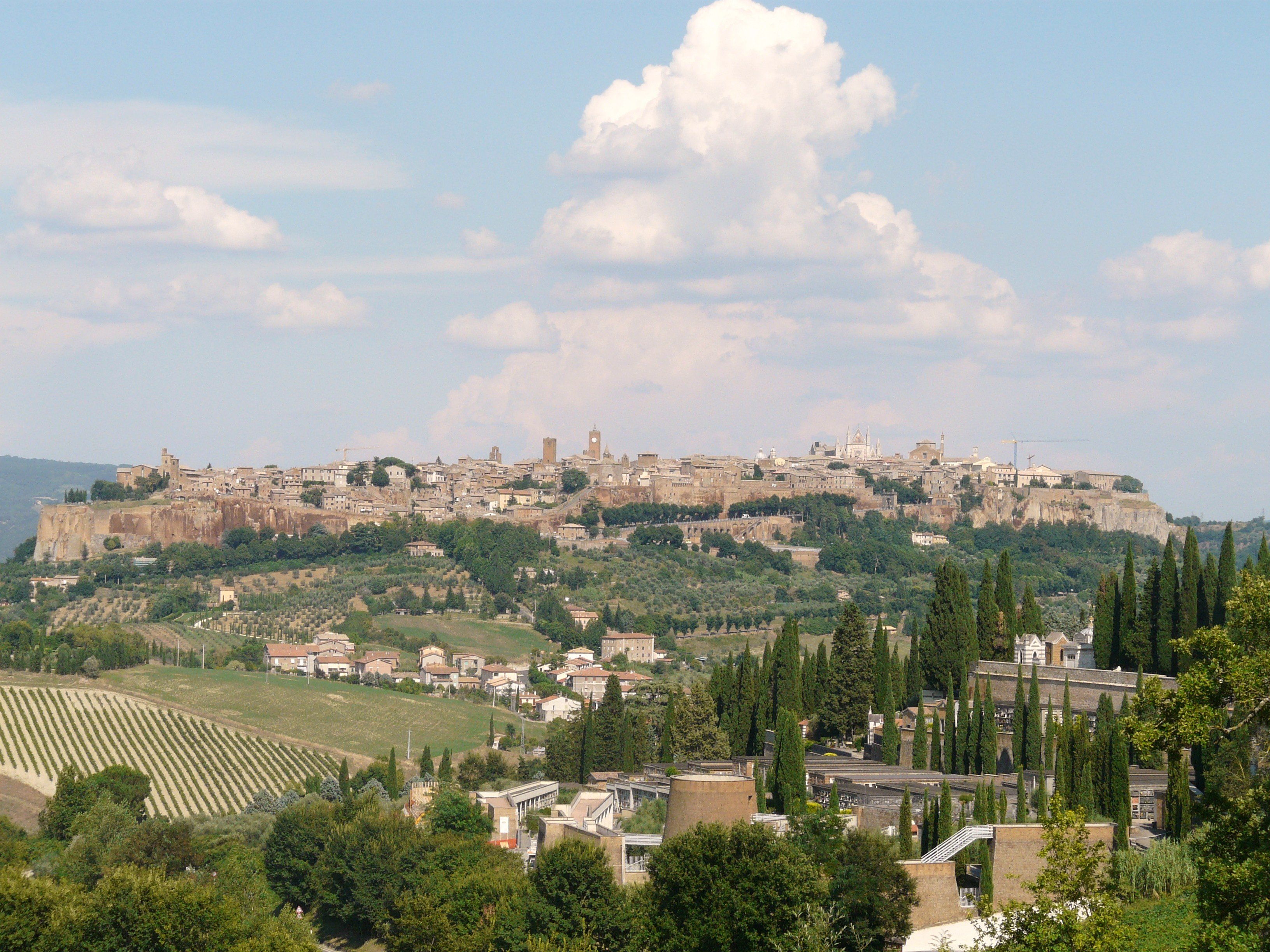 Orvieto, Umbria, Italia